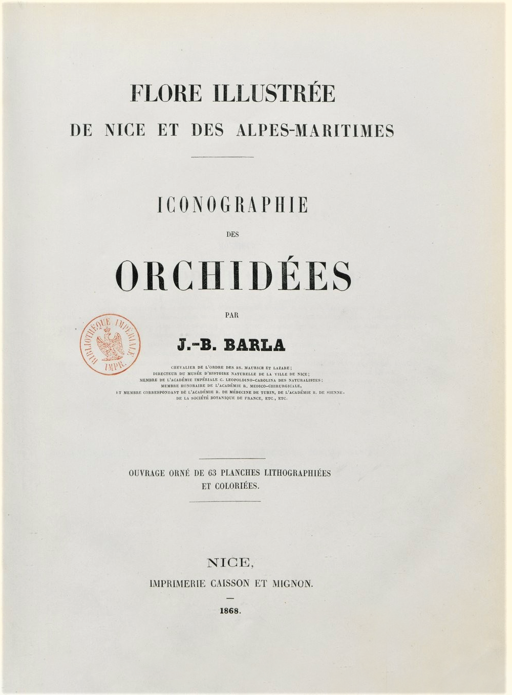 Jean-Baptiste Barla: „Flore illustrée de Nice et des Alpes-Maritimes : Iconographie des orchidées, Nice”, Verlag Caisson et Mignon, Nice 1868, Deckblatt